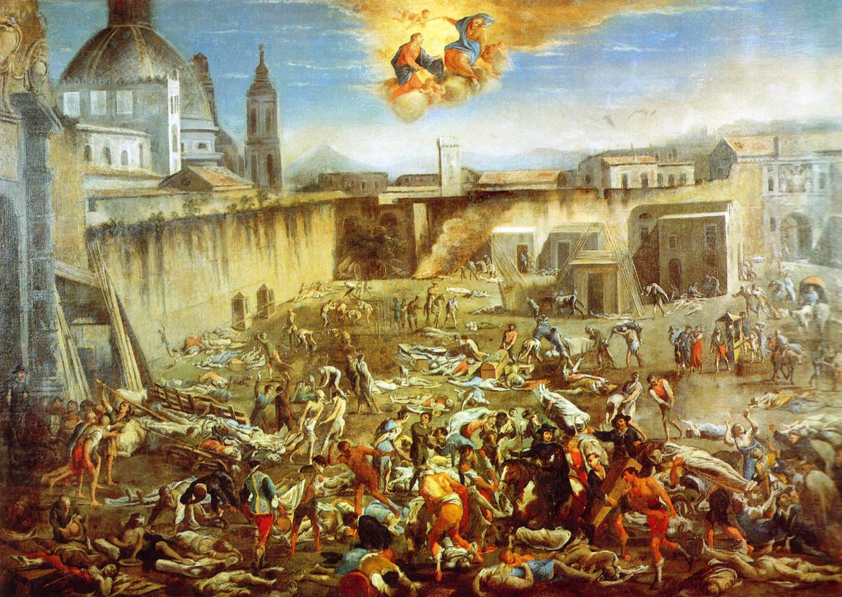 Largo Mercatello a Napoli durante la peste del 1656.